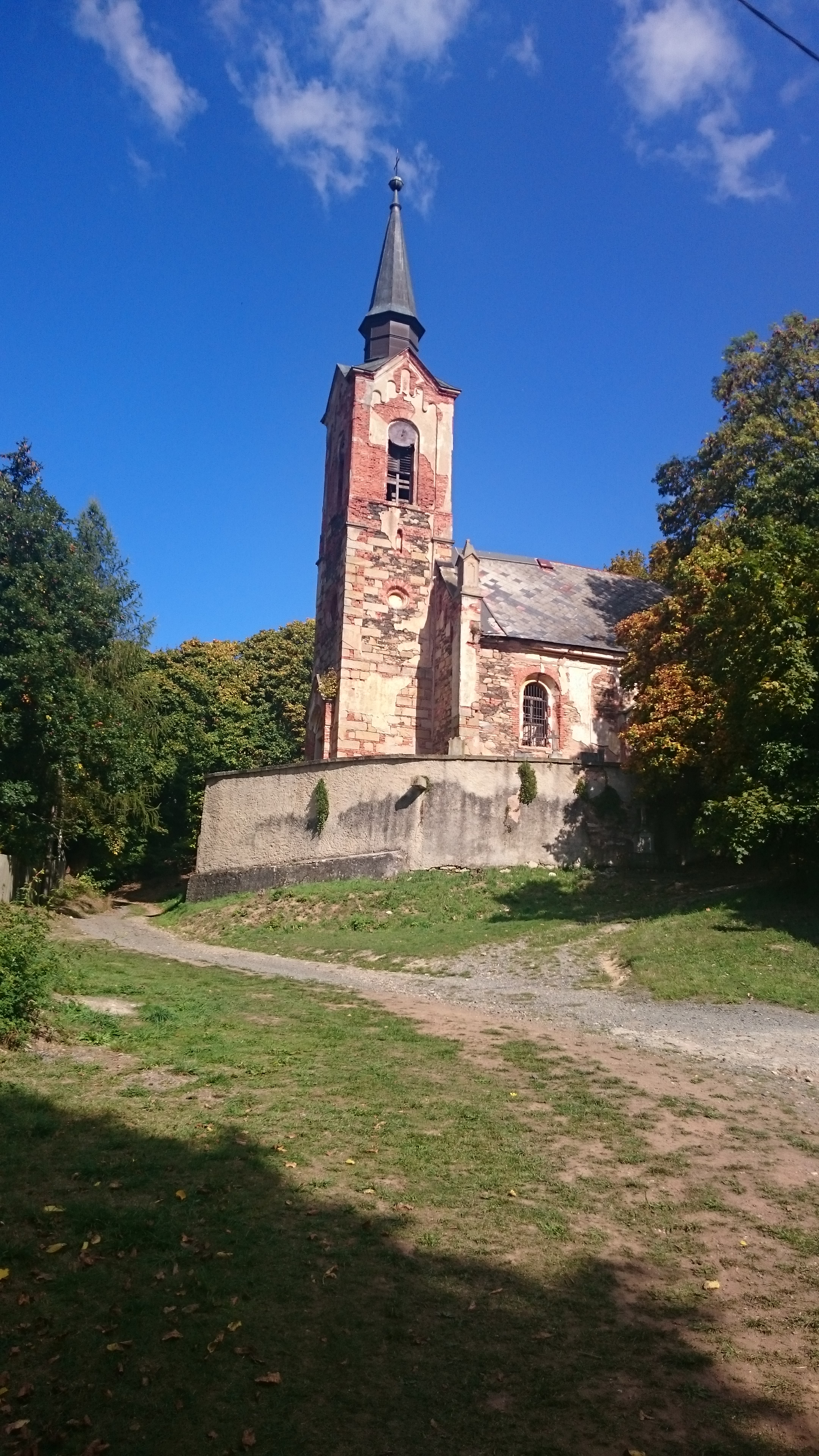 Interiér kostela svatého Jiří v Lukové. Okres Plzeň-sever, Česká republika.